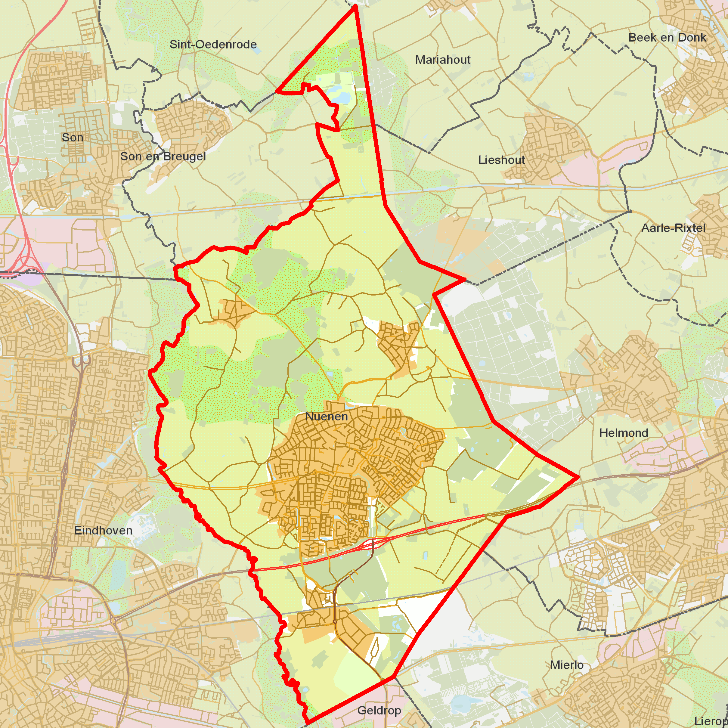 BAG woonplaatsen - Gemeente Nuenen c.a..png